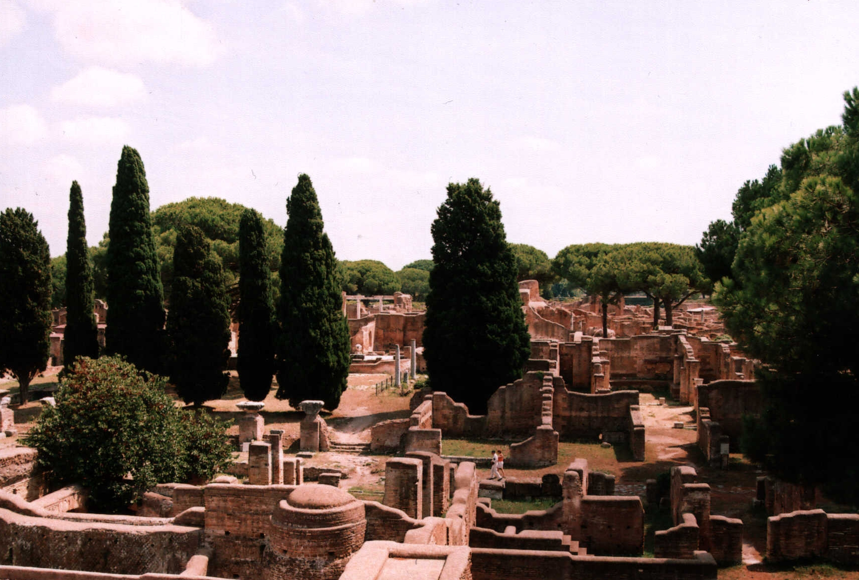 Ostia Antica